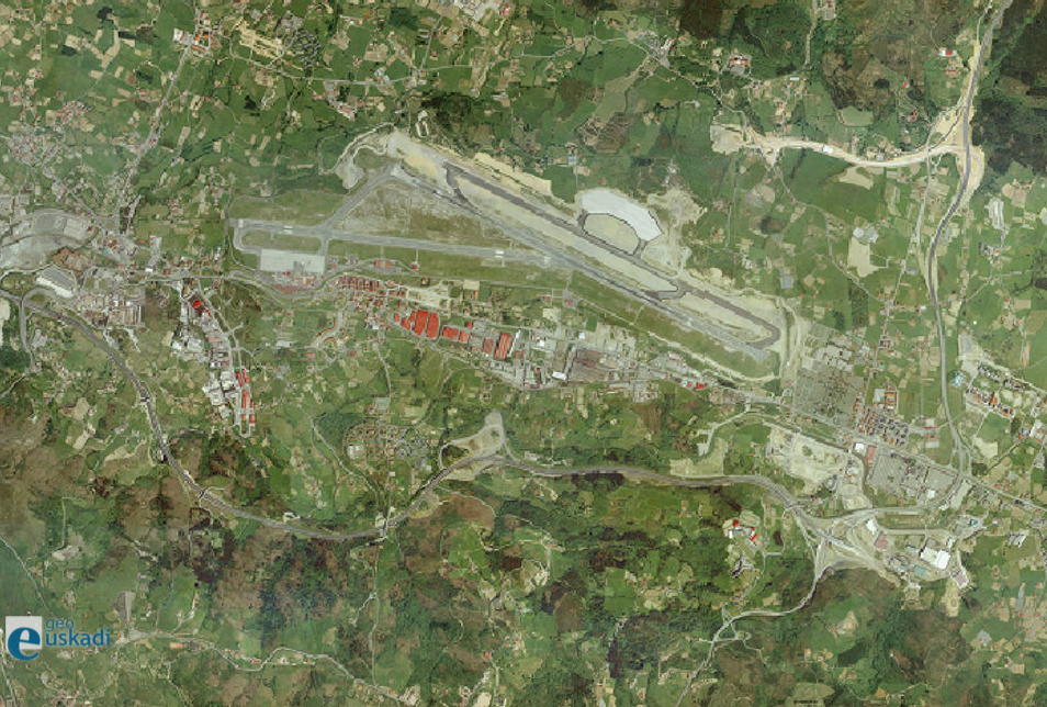 Bilboko aireportuaren ortoargazkia